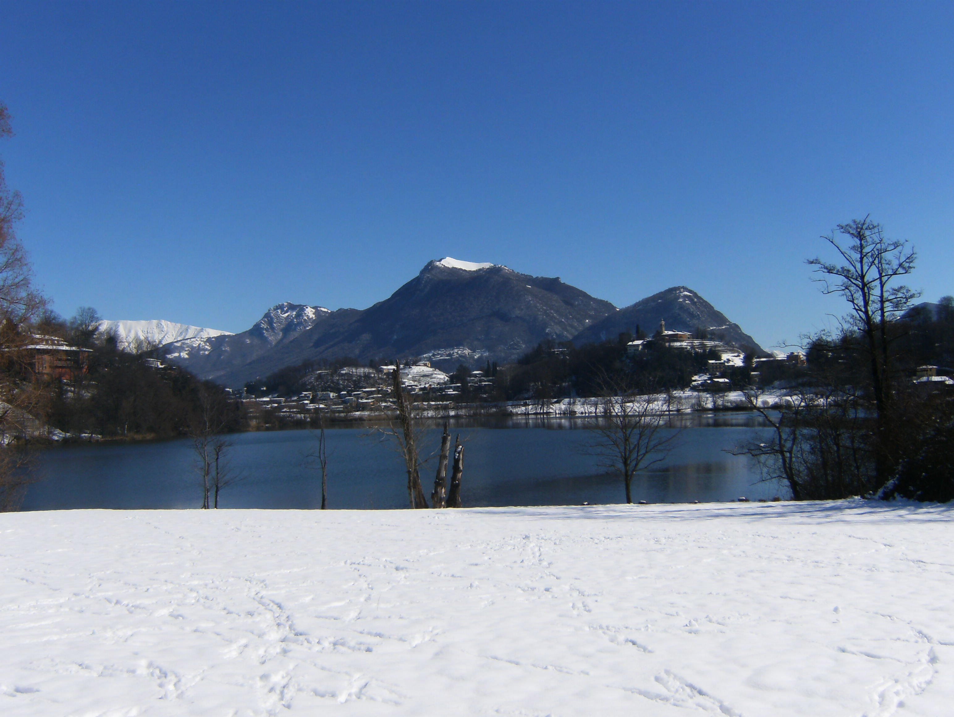 Lago di Muzzano, Lugano TI